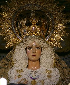 Virgen de la Esperanza de Málaga, Archicofradía del Paso y la Esperanza